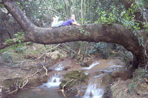 תמונת זרימה מנחל בצת עם ילדה על עץ.